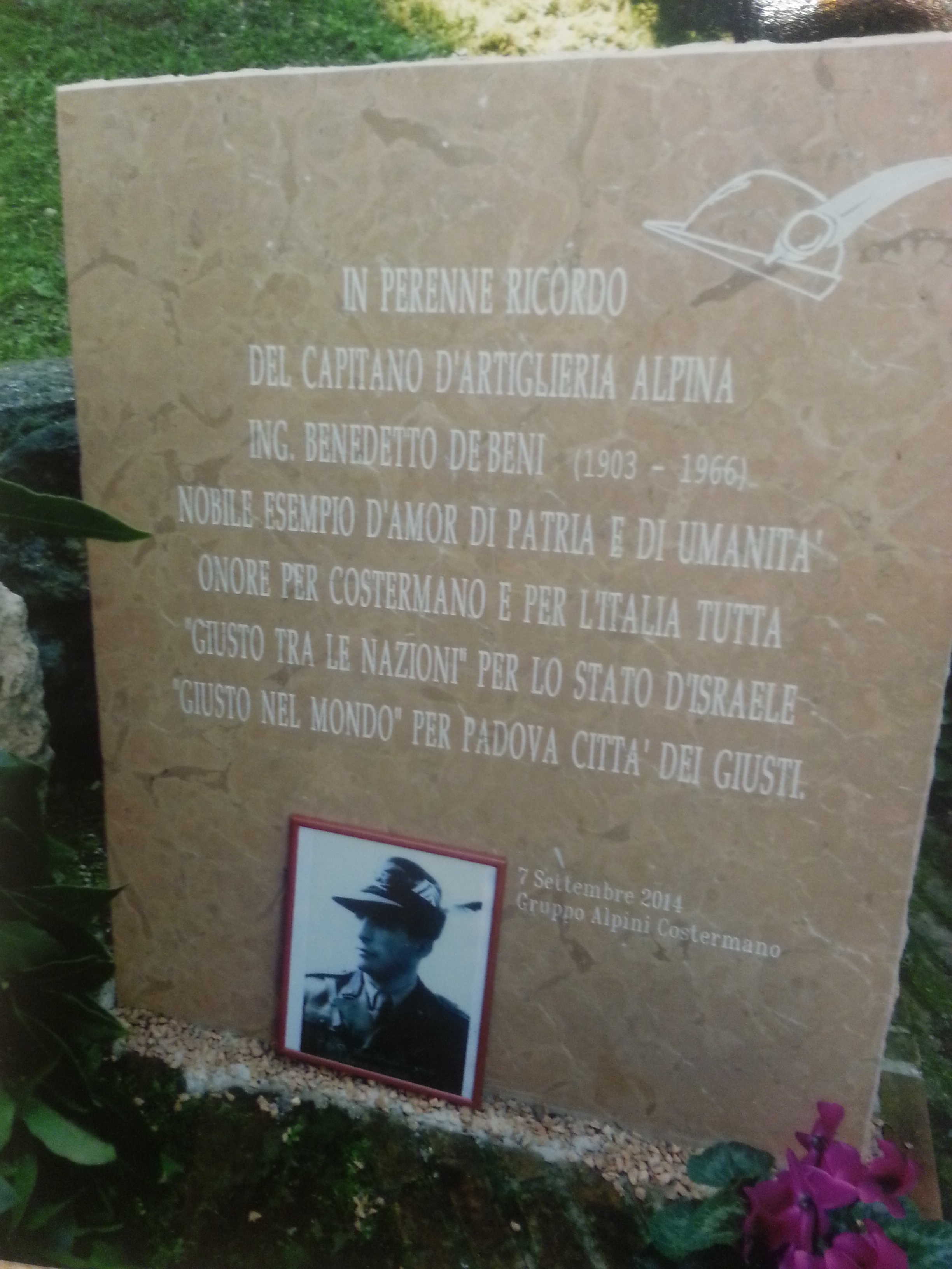 Lapide commemorativa posta nel giardino dei Giusti tra le nazioni